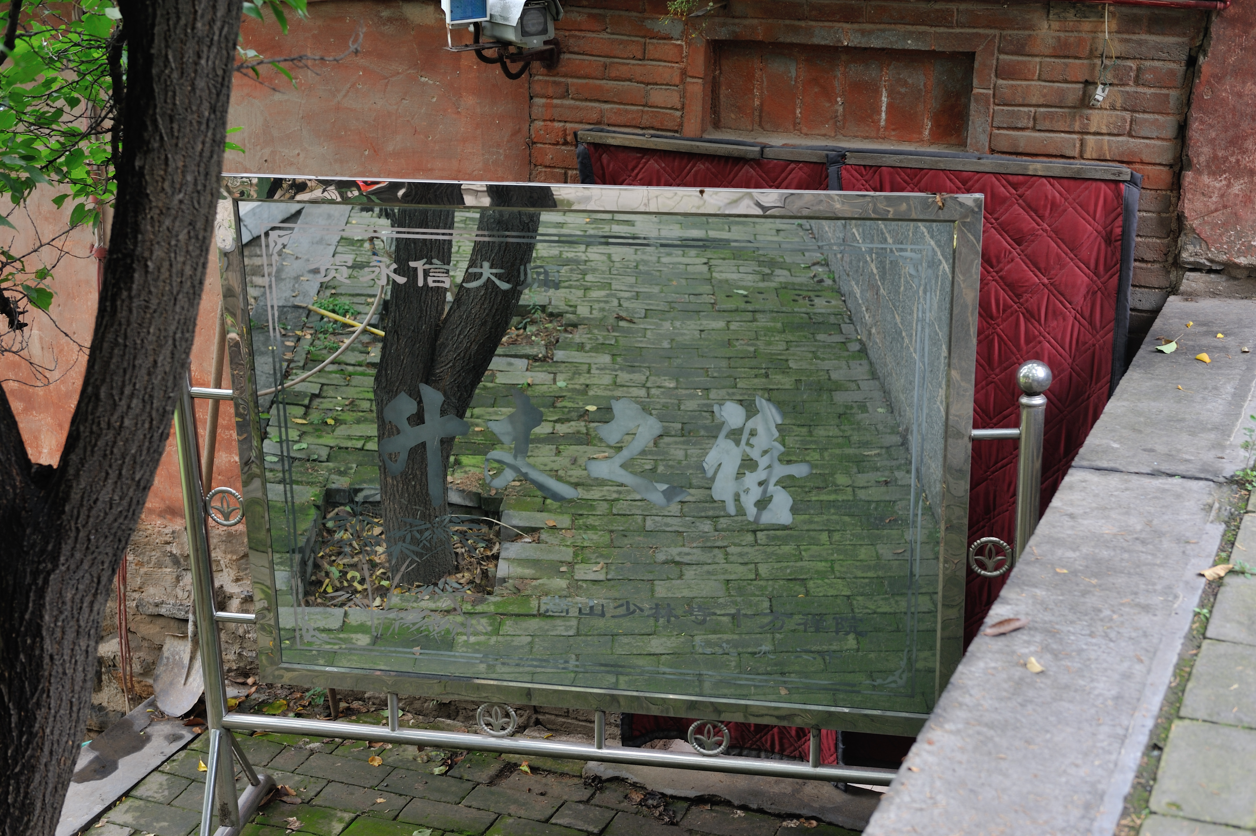 少林寺初祖庵内恭贺释永信升座匾